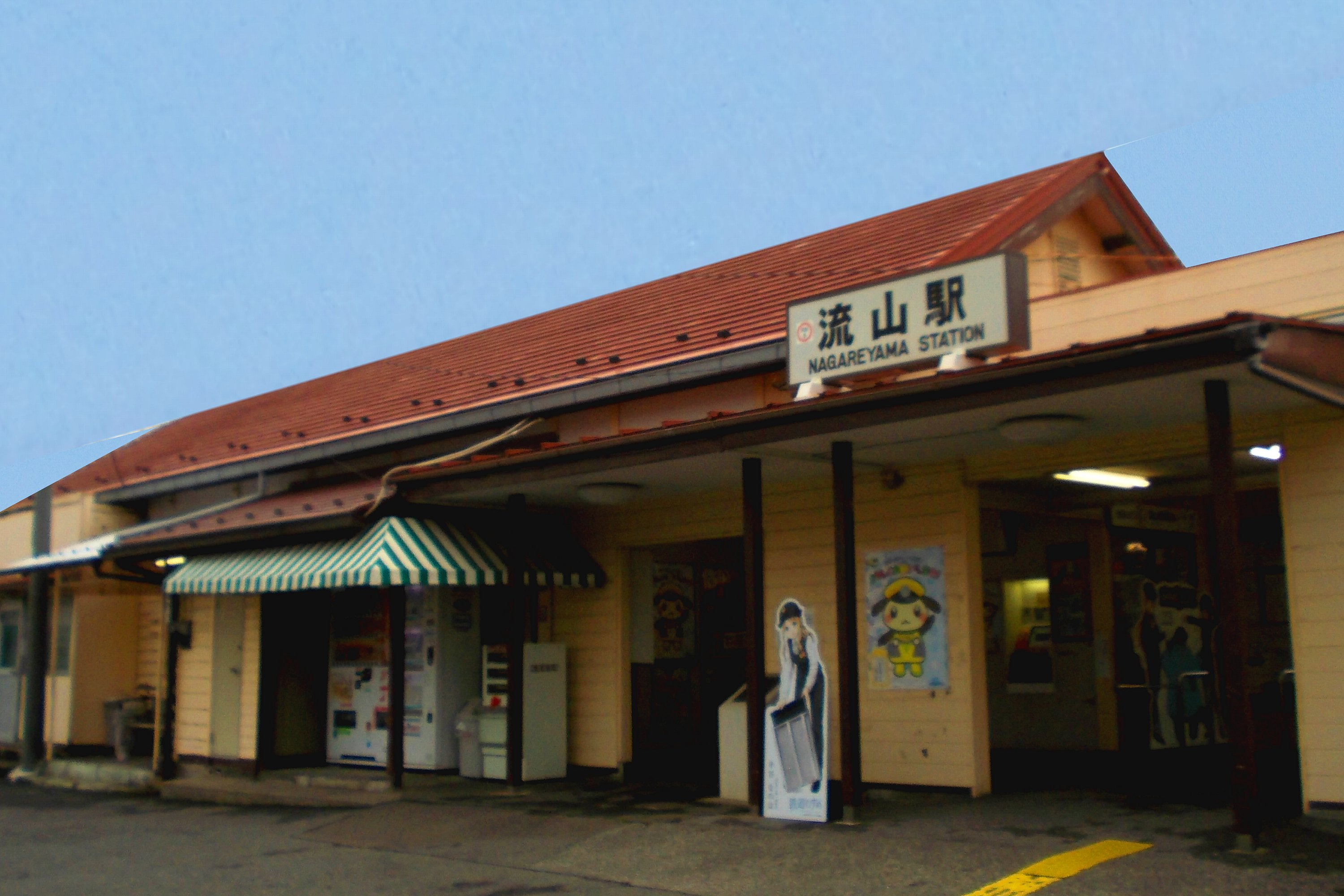 流山鉄道・流山駅